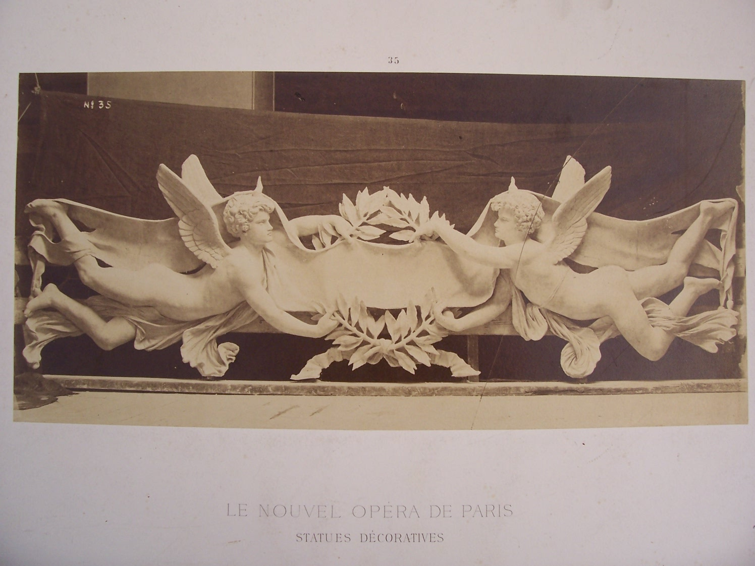 Le Nouvel Opéra de Paris. Statues décoratives (35 planches) Planche 35: Arc doubleau de la scène (par Chabaud)